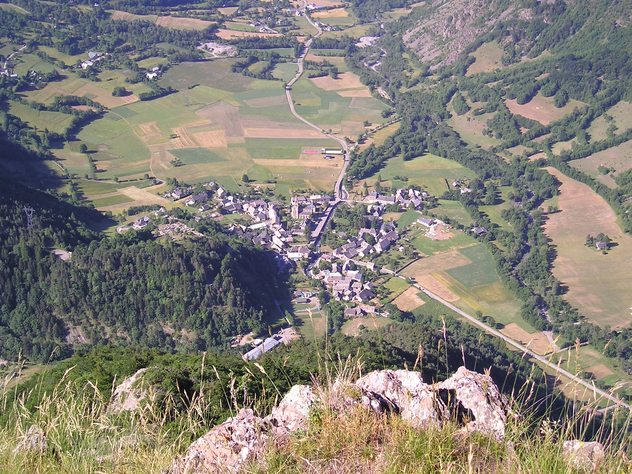 Le village du Périer (Isère - France) vu depuis la roche du Touret